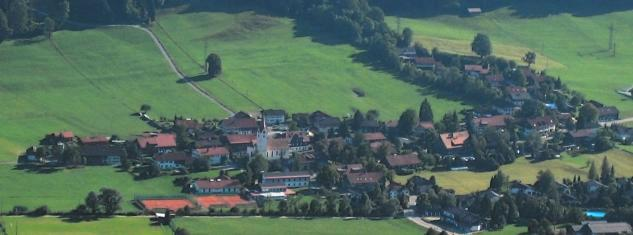 Thalkirchdorf, 24.8.2003, lizensiert unter GFDL